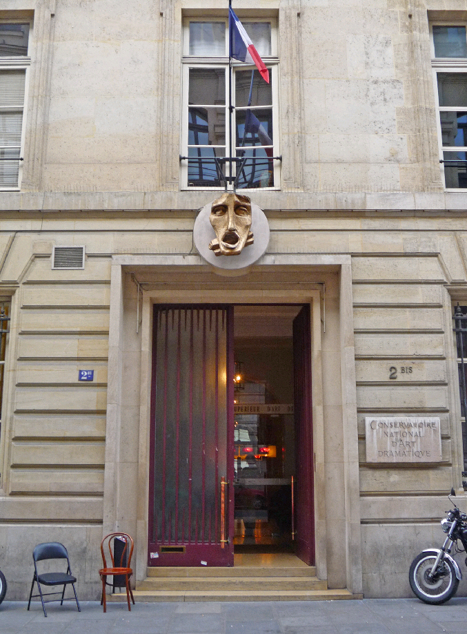 Conservatoire national d'Art dramatique; 2bis, rue de la Conservatoire, Paris, 9e arr.